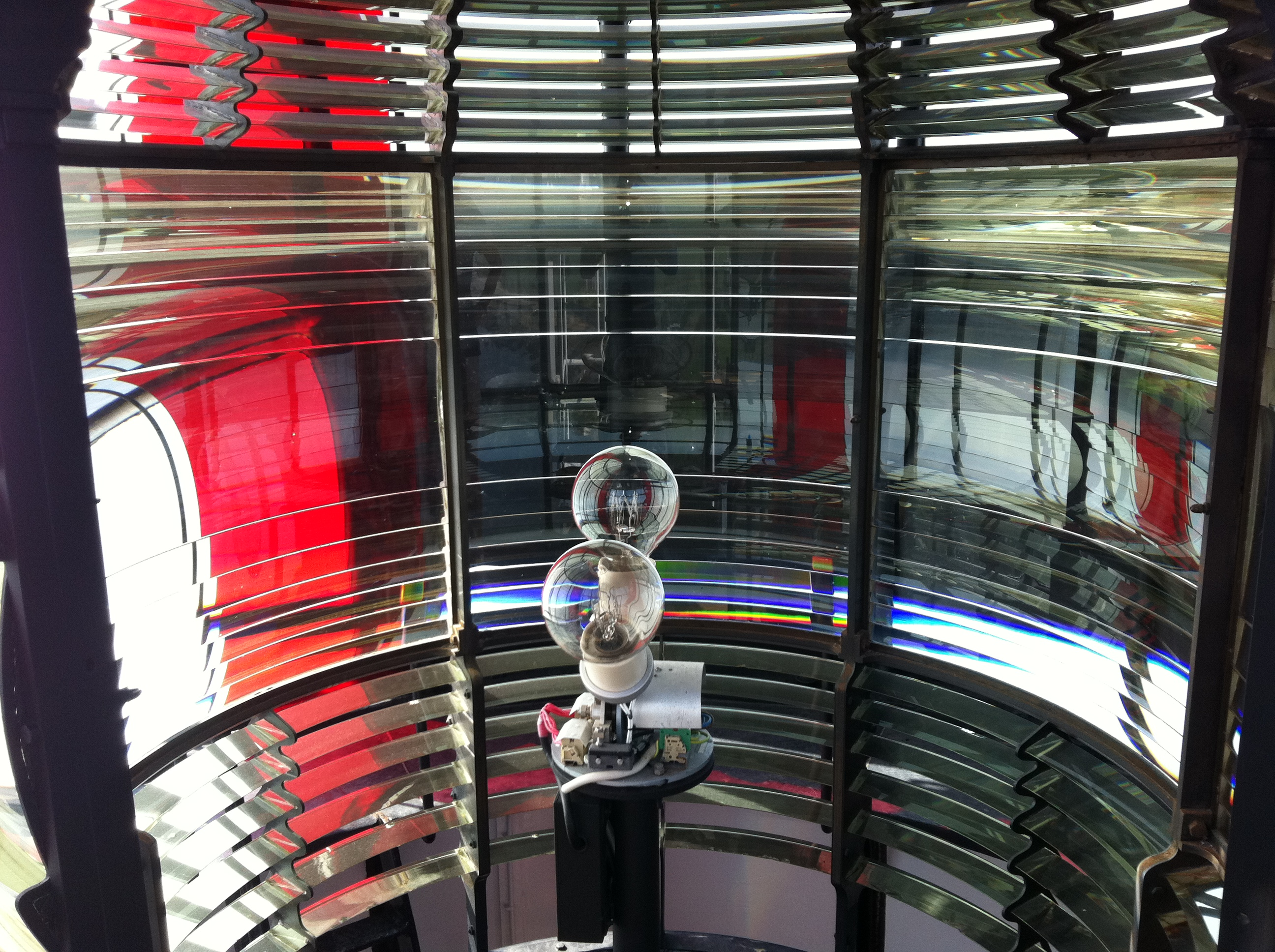 Lionsaí i dTeach solais, Rinn an Róistigh, Co. Chorcaí